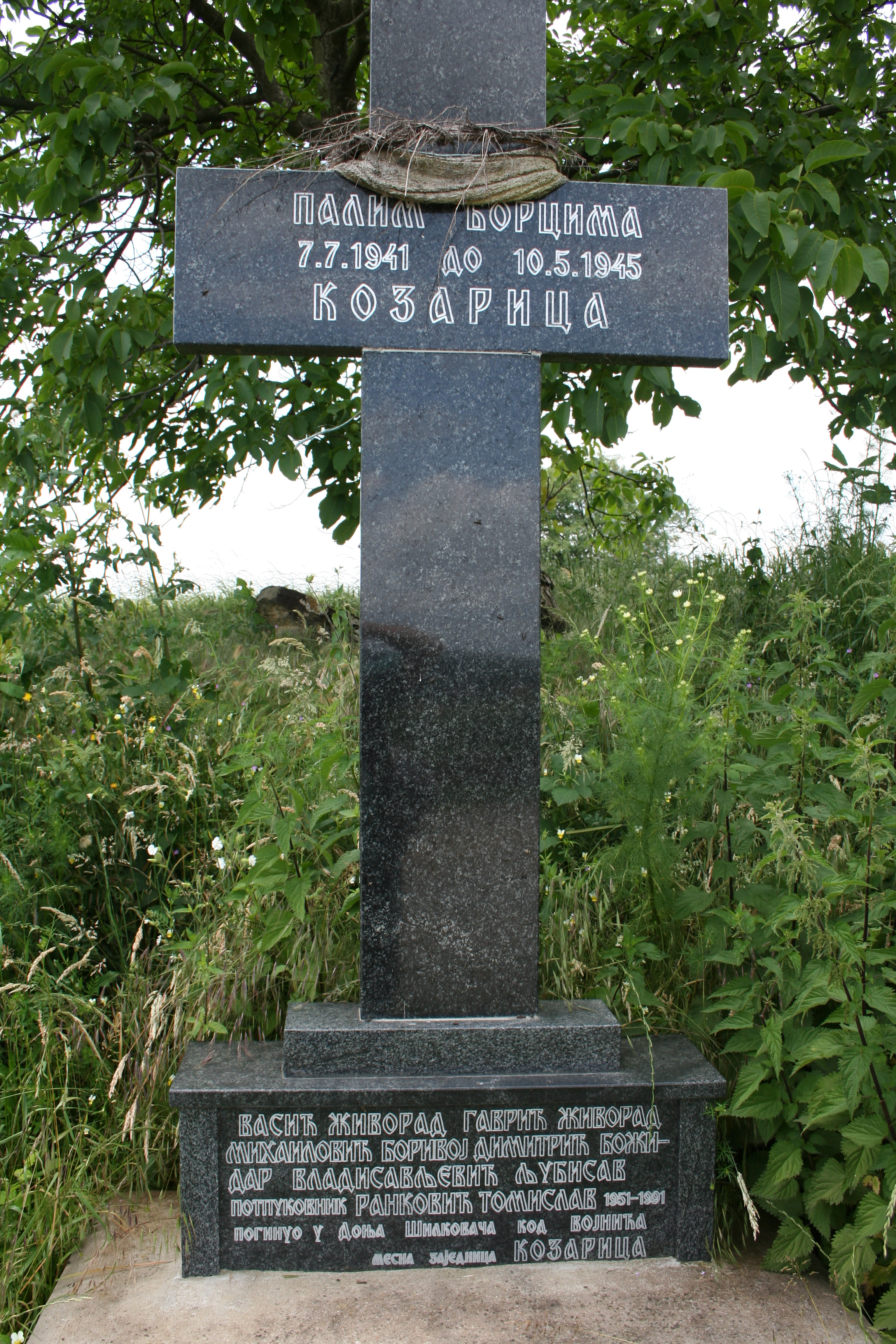 Kozarica, Spomenik palim borcima, opština Vladimirci